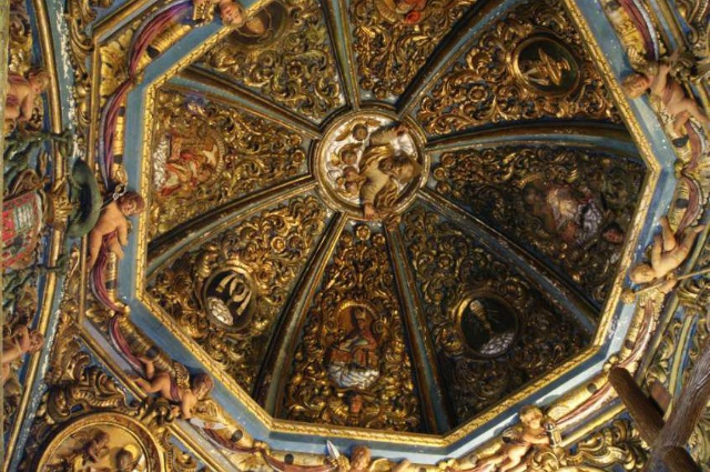 Camarin